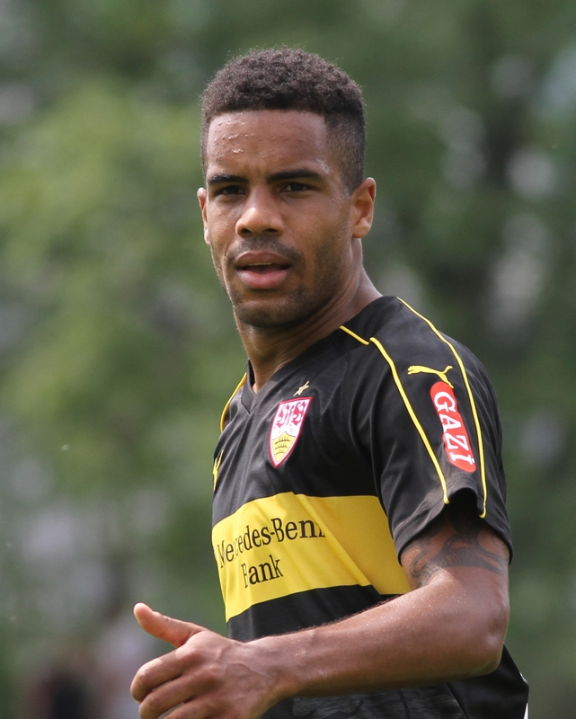 Daniel Didavi beim offiziellen Trainingsauftakt. Aufgenommen von